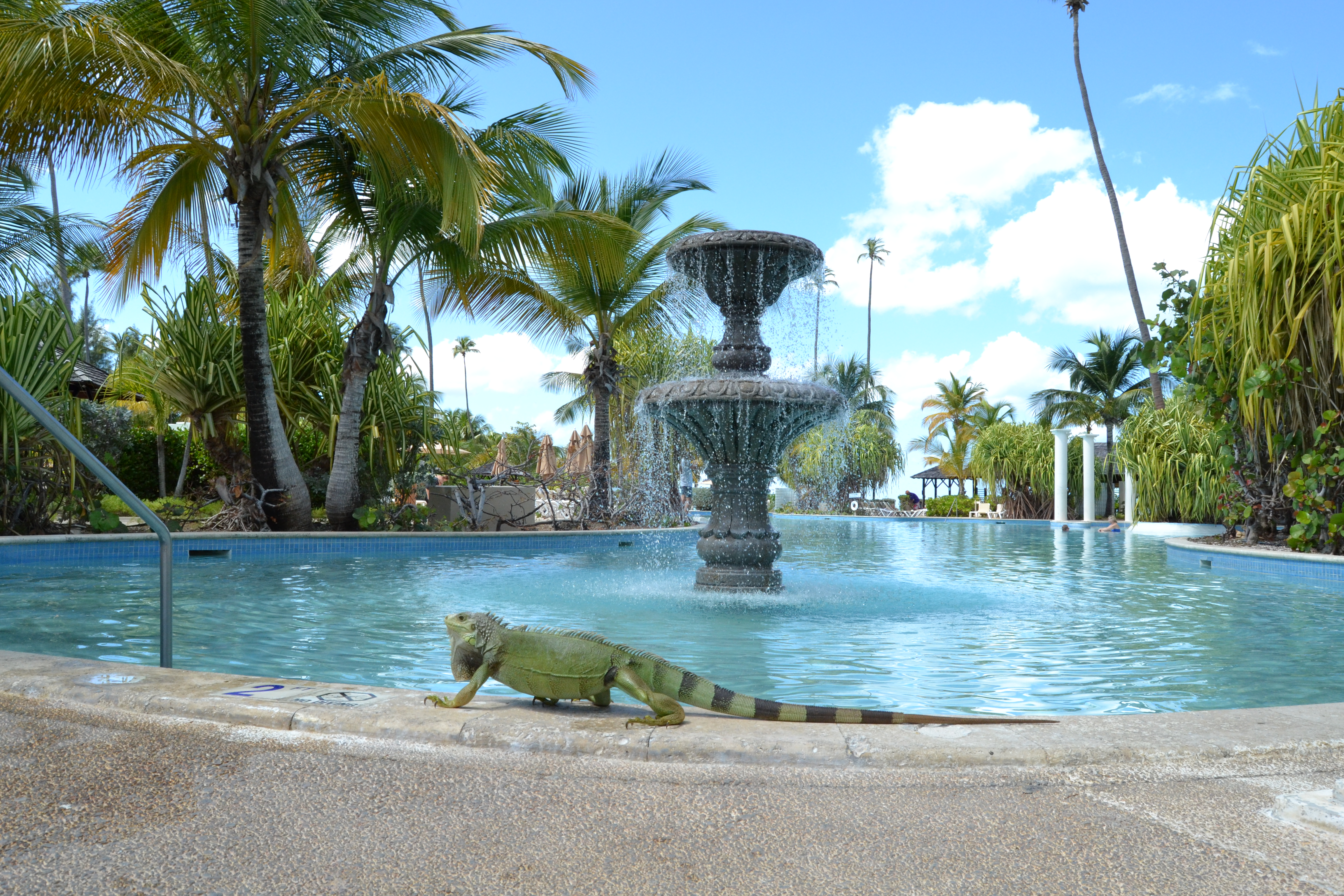 Zarzal, Río Grande 00745, Puerto Rico